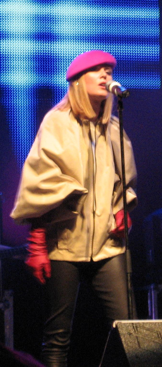 Róisín Murphy in Belgrade, Serbia